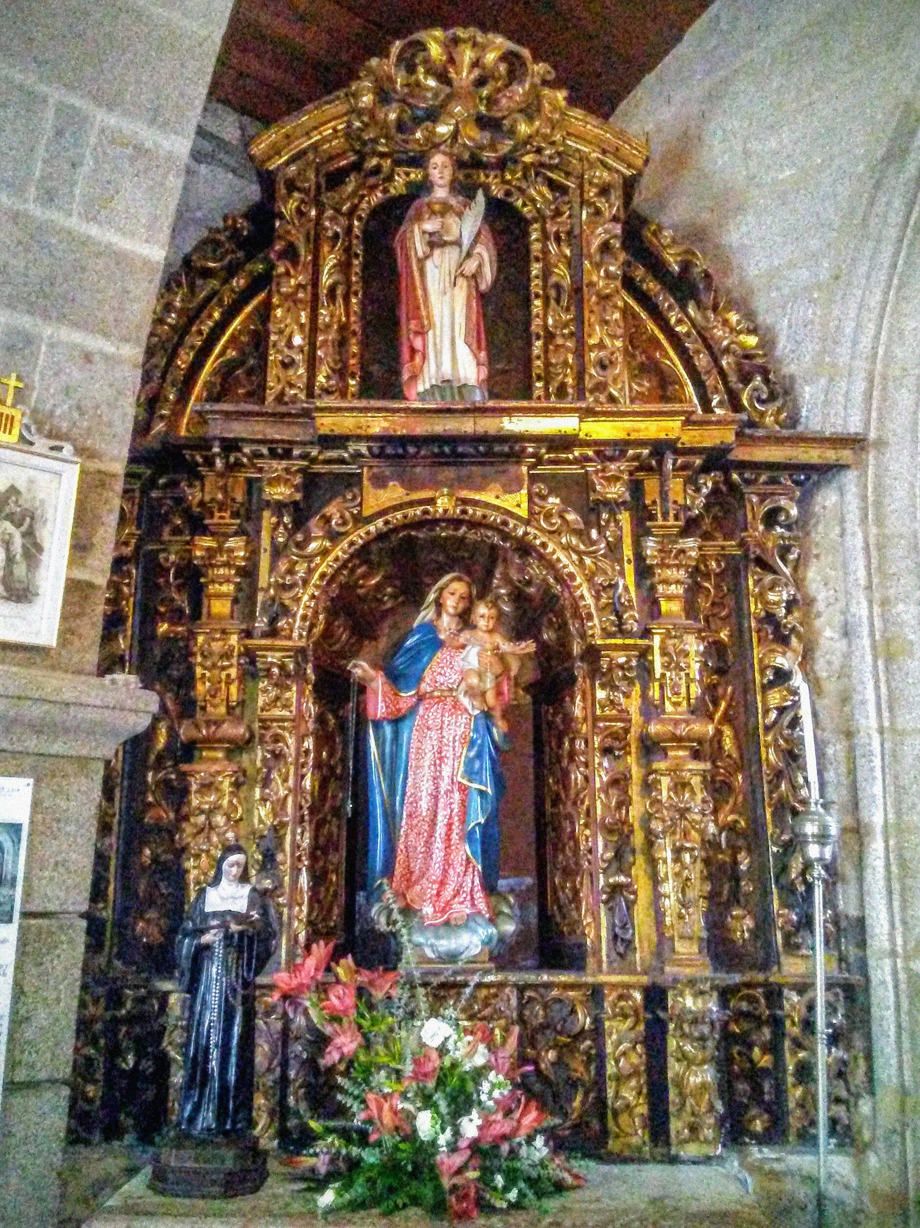 Iglesia de San Ginés de Padriñán